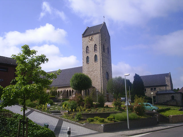 Theresiakerk te Ransdaal. Foto zelf gemaakt, 6 juni 2006.